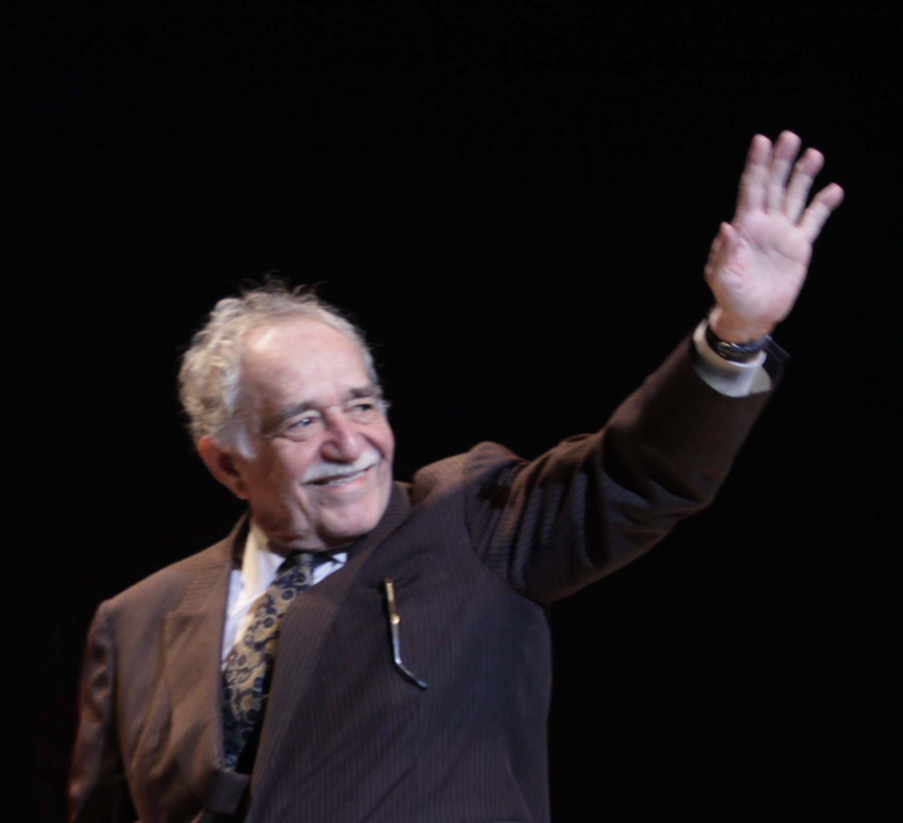 19/03/2009 La Ministra de Cultura de Colombia Paula Moreno y el escritor colombiano Gabriel García Marquez fueron los encargados de entregar el Mayahuel de Plata a Victor Gaviria